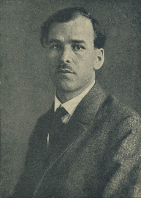 Rudolf Březa, český sochař a medailér.